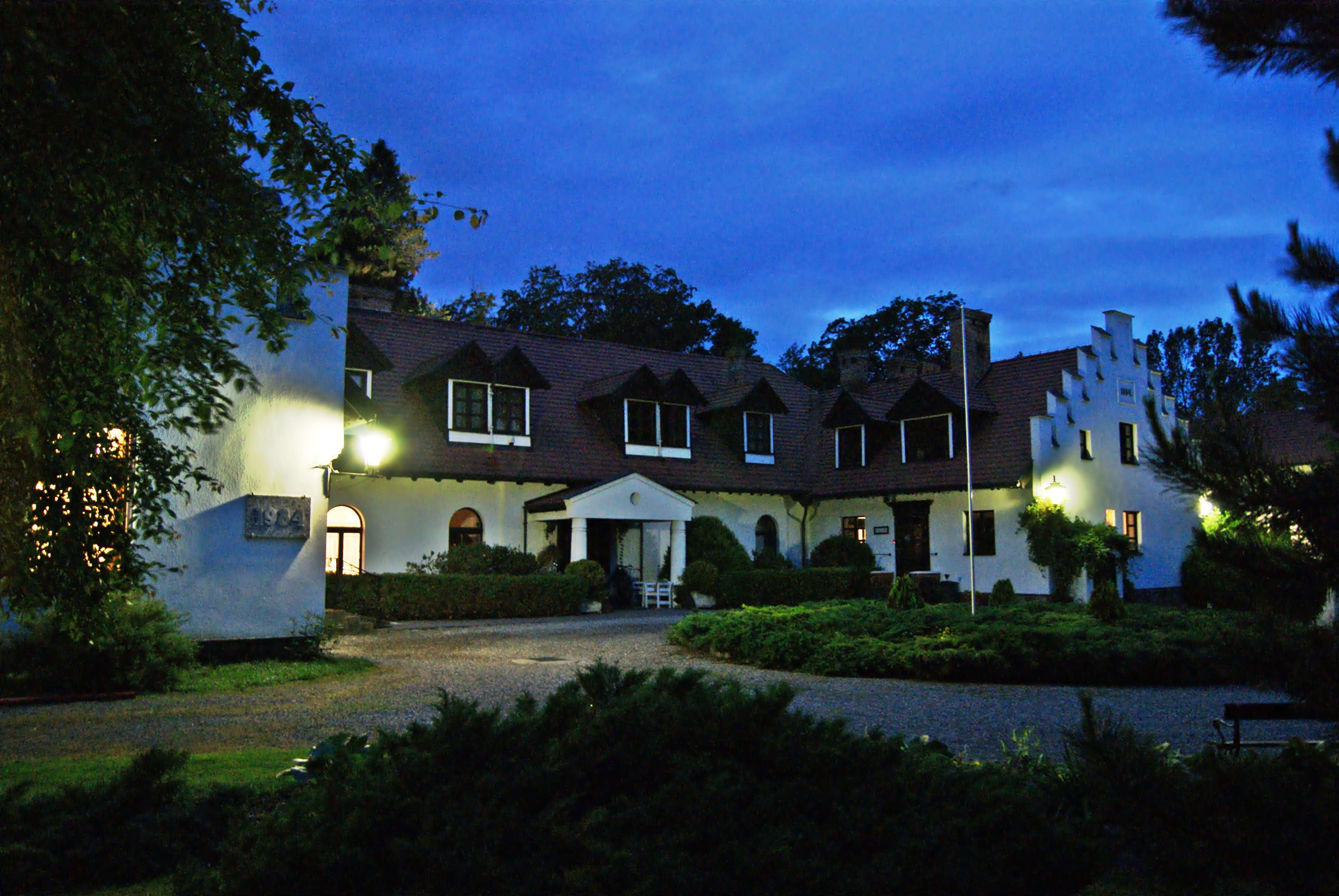 Zabytkowy dwór z przełomu XVIII i XIX wieku.Obecnie Klinika Rehabilitacyjna Chorób Kręgosłupa